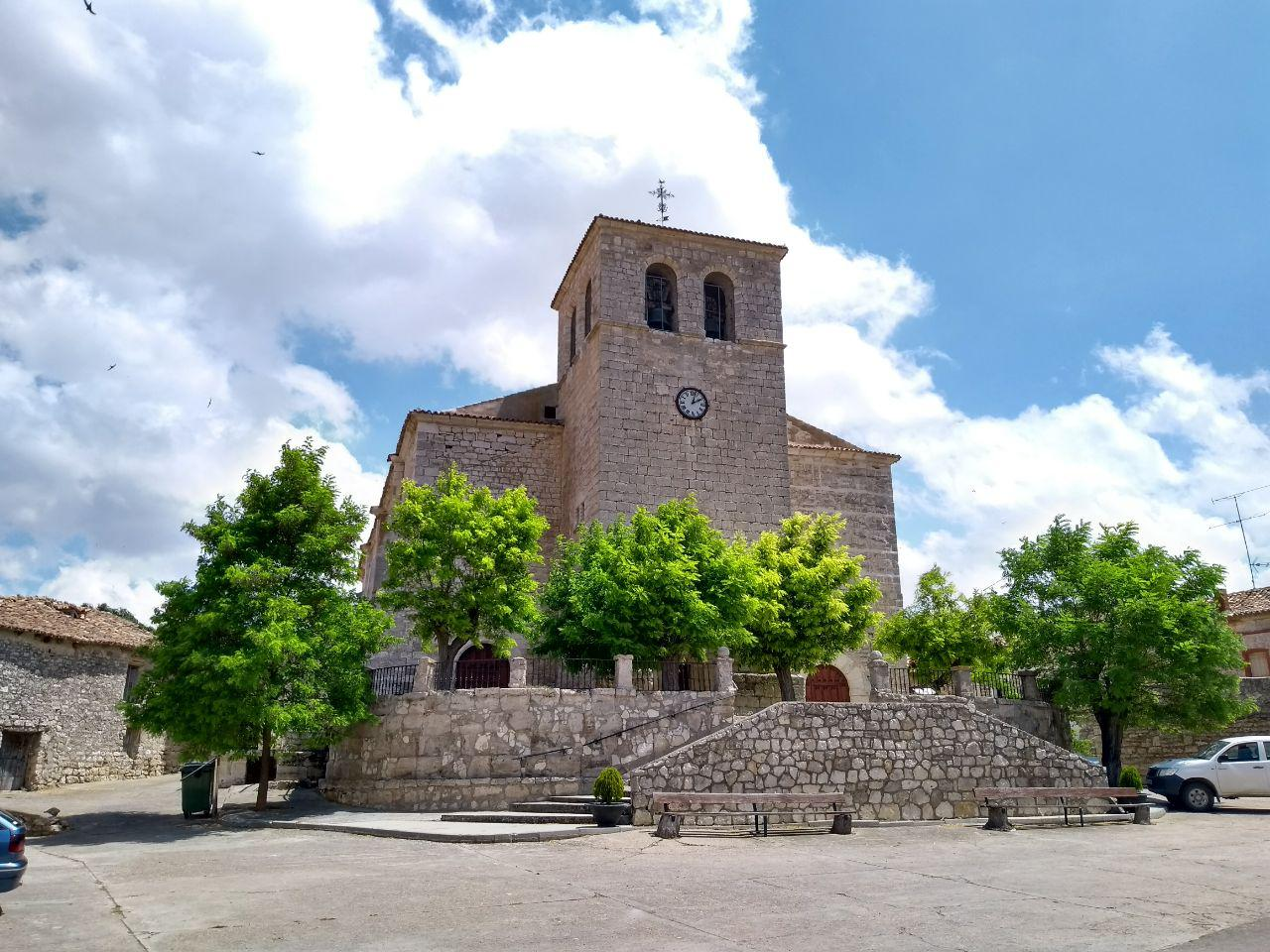 Iglesia de San Andrés de Villahán, provincia de Palencia, España. Siglo XVI con ampliación posterior del S. XVIII.